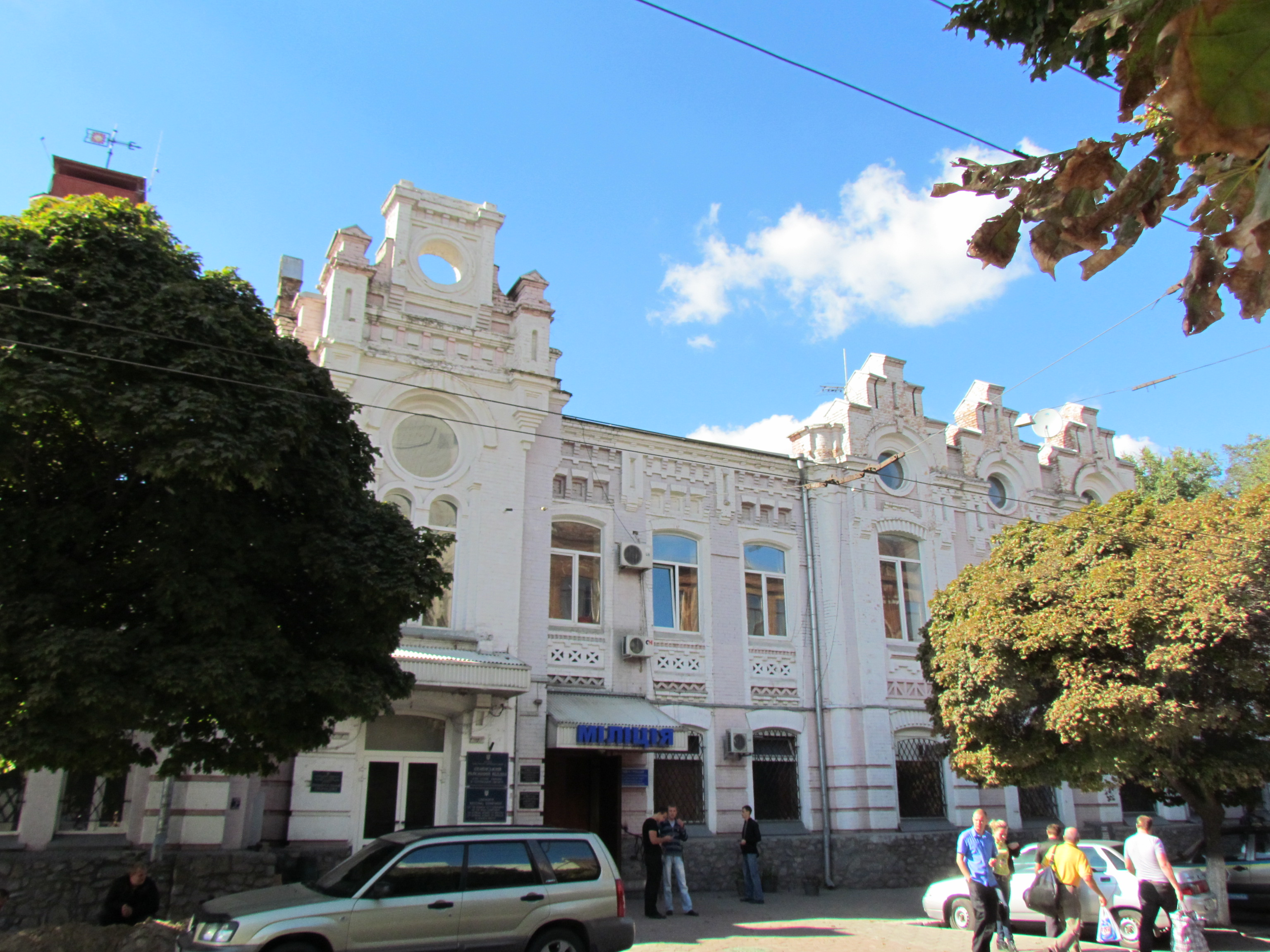 Україна, Харків, вул. Малиновського, 1